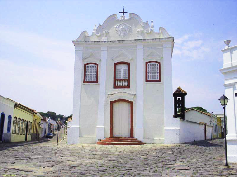 Endereço: Rua Luiz do Couto, S/Nº – Cidade de Goiás – GO. Tel: (62) 3371-1087 Horários a partir de 2 de janeiro de 2013: De terça-feira a sábado, das 9h às 18; e domingos e feriados, das 9h às 15h Foto: Márcio Couto migre.me/cJCxT